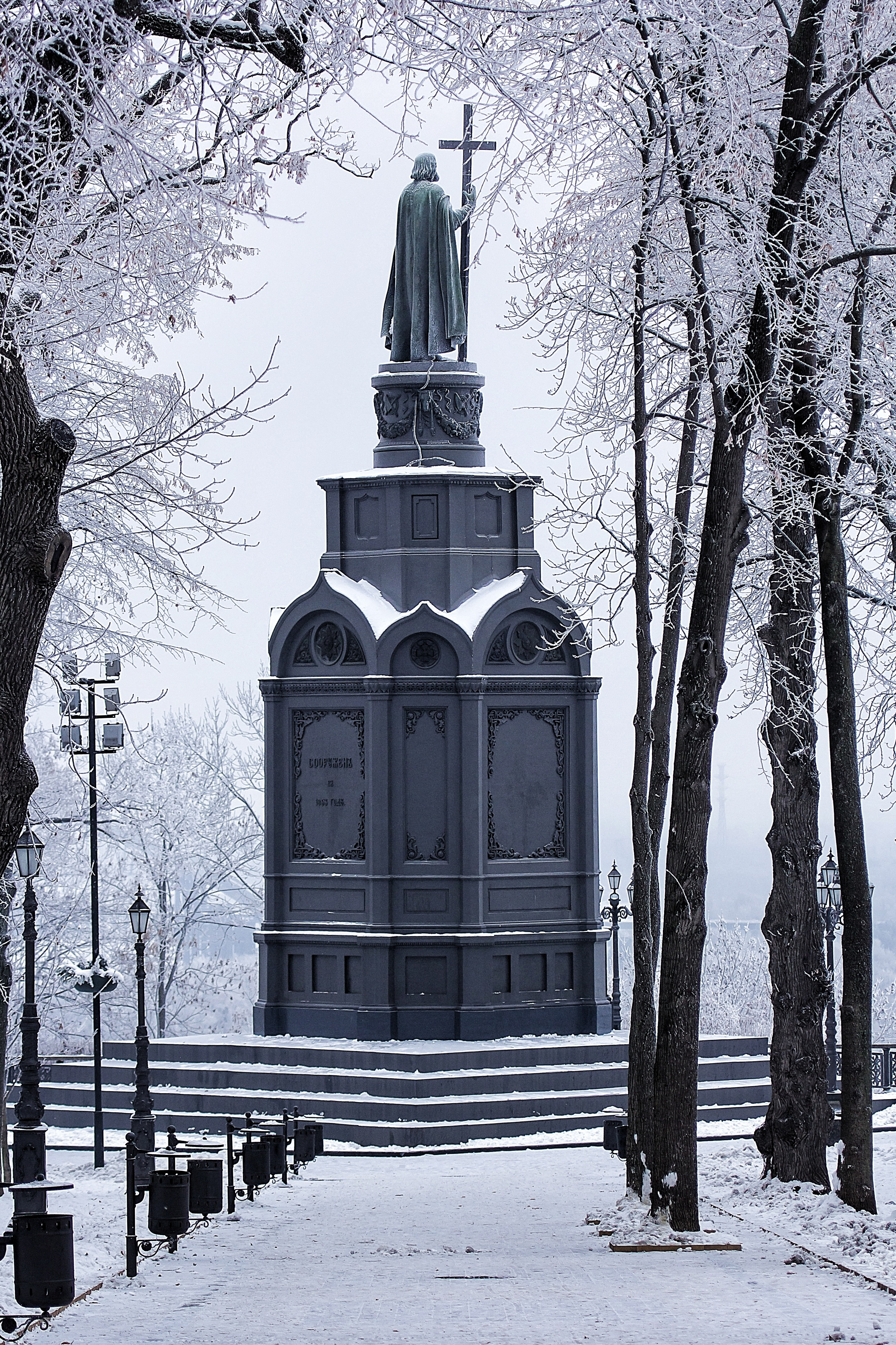 Пам'ятник князю Володимиру, Київ, Володимирська гірка